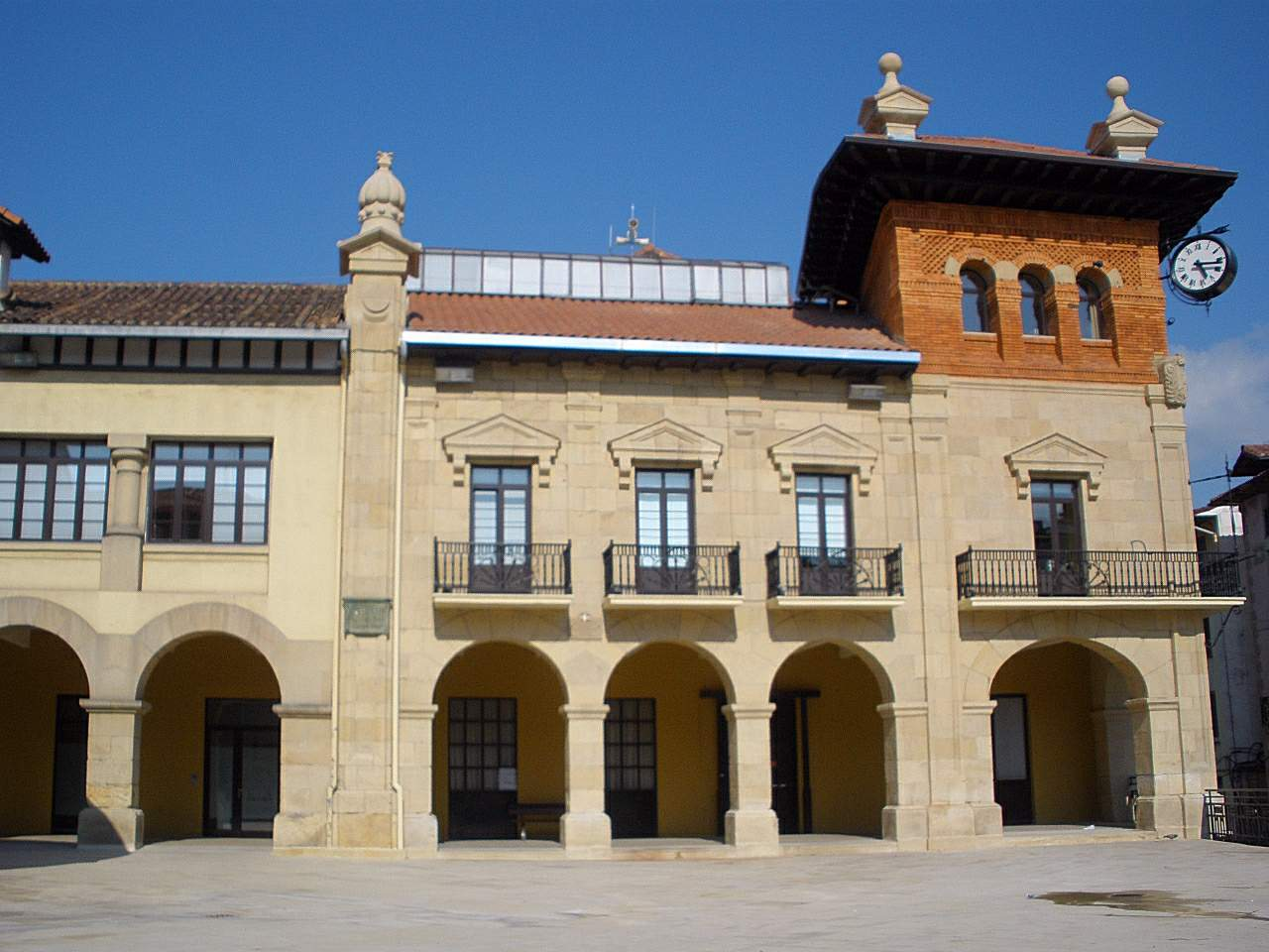 Beasain - Ayuntamiento